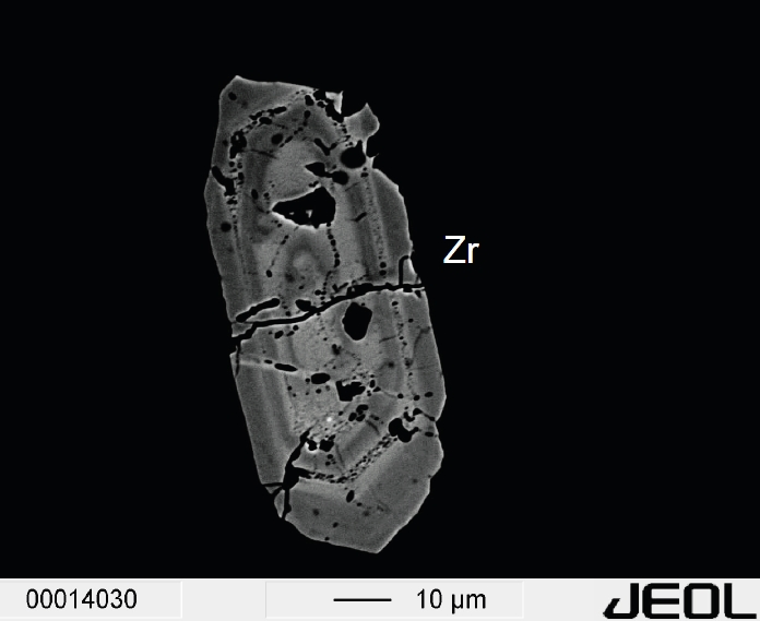 zonierter Zirkon